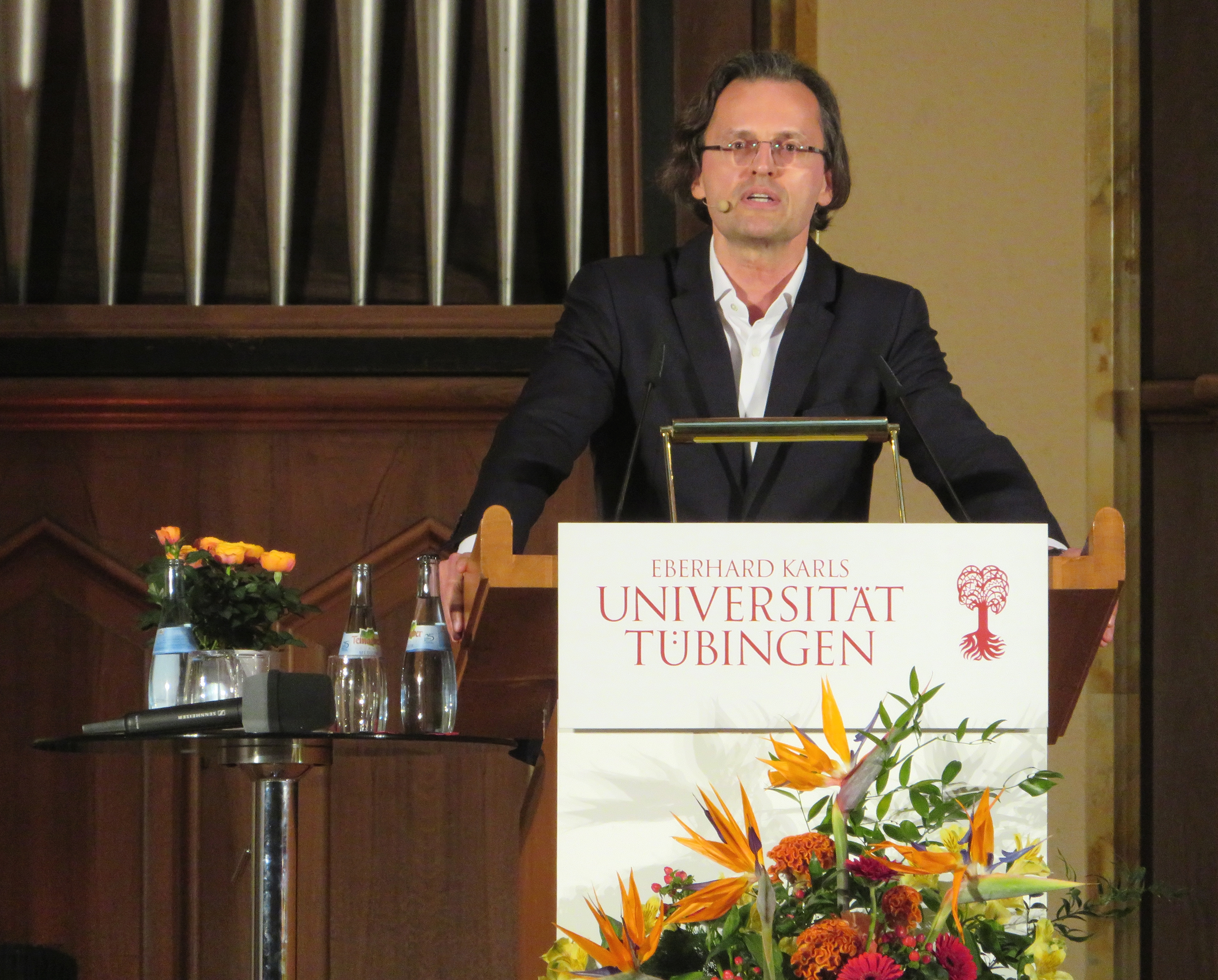 Prof. Dr. Bernhard Pörksen (* 1969), Professor für Medienwissenschaft an der Eberhard Karls Universität Tübingen, bei der Eröffnung der 16. Tübinger Mediendozentur am 21. Mai 2019.